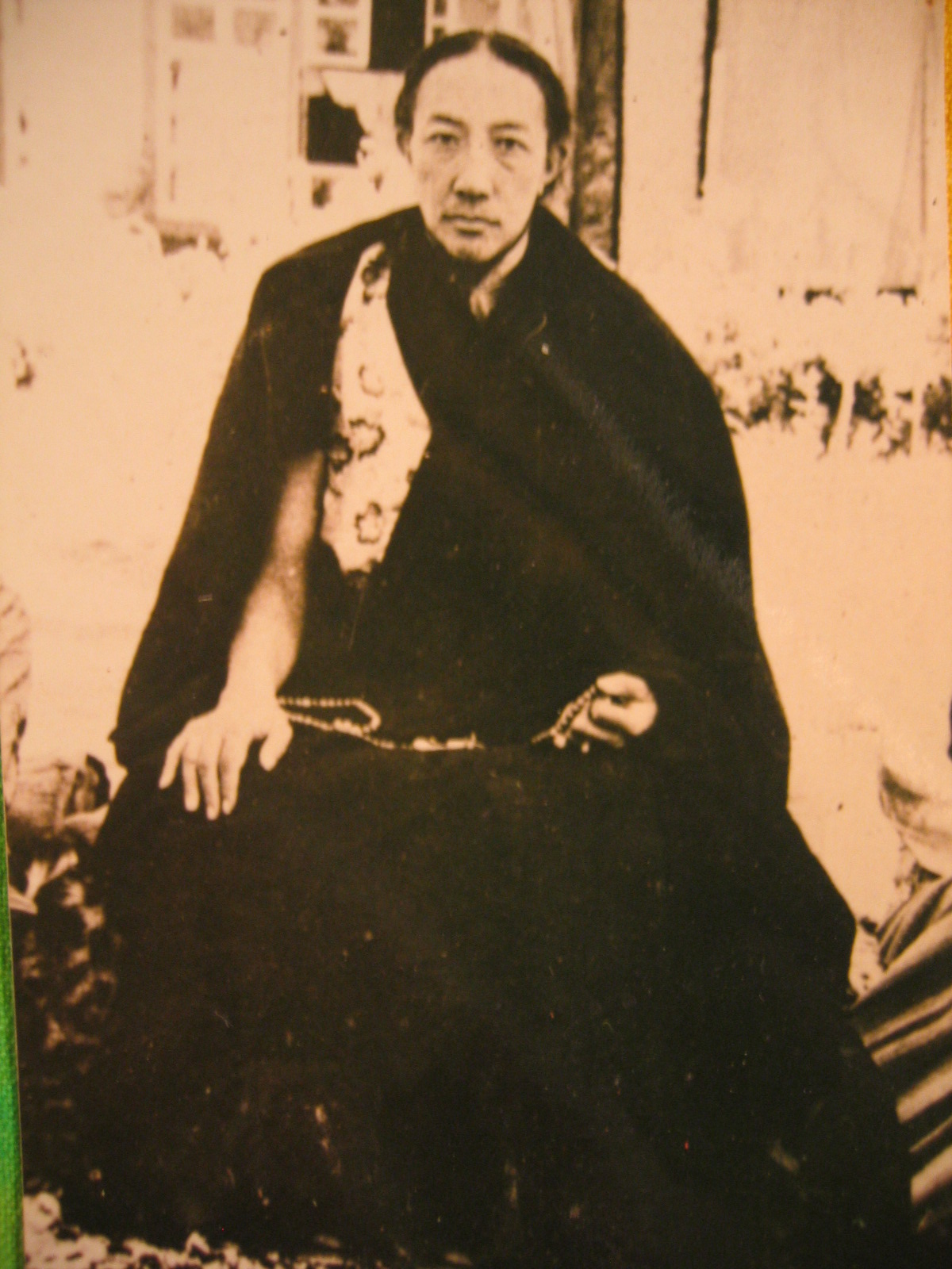 Дилго Кьенце Ринпоче